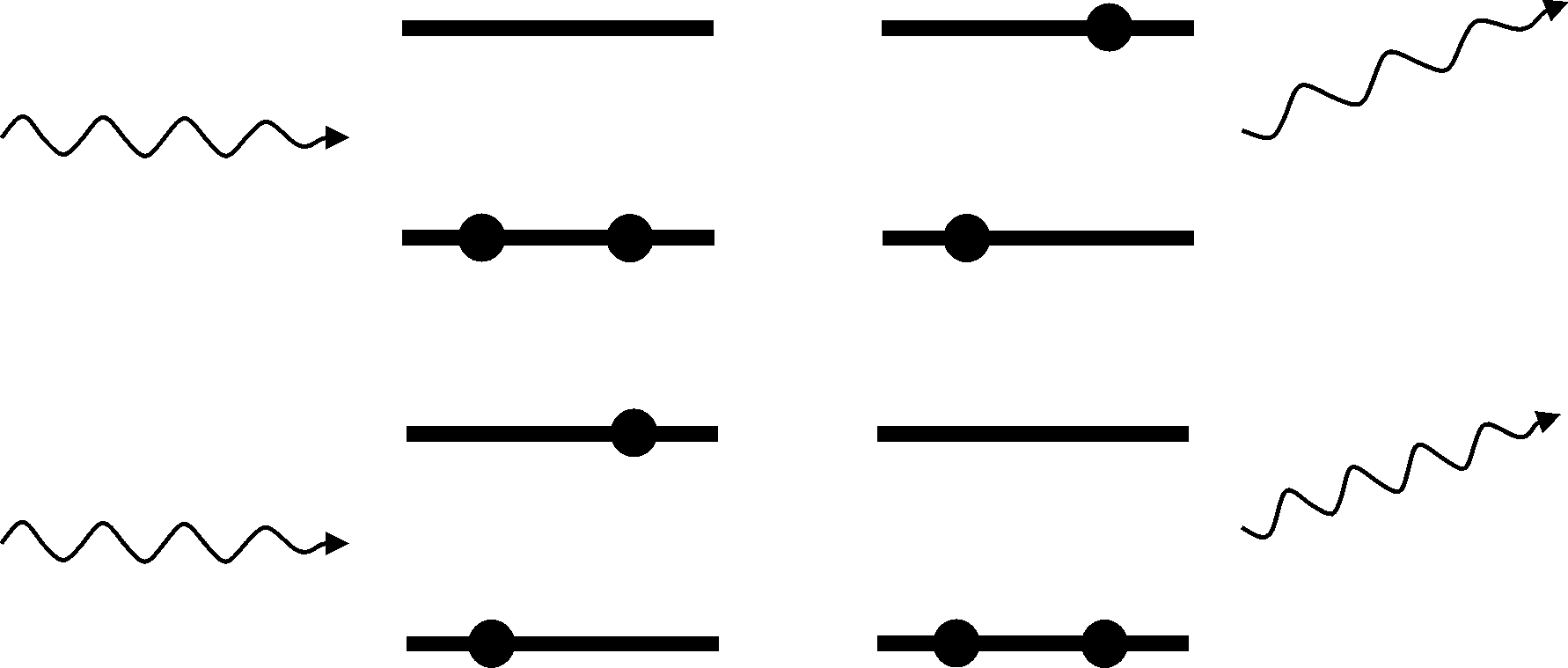 Shematski prikaz Ramanovog raspršenja.